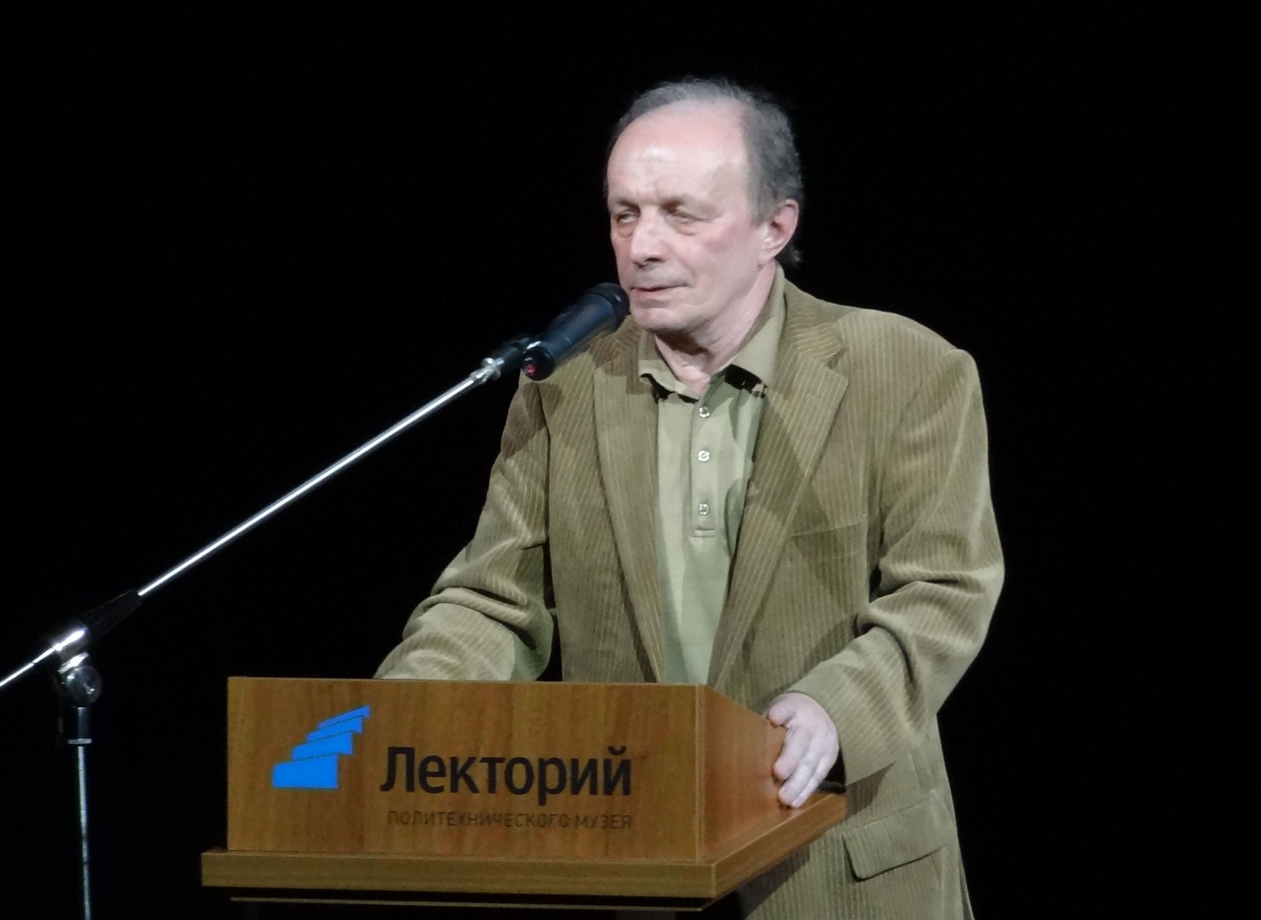 Андрей Юрьевич Арьев — советский и российский литературоведение, литературный критик, прозаик. Выступление на торжественной церемонии вручения российской национальной премии «Поэт». Москва, 2011 год.